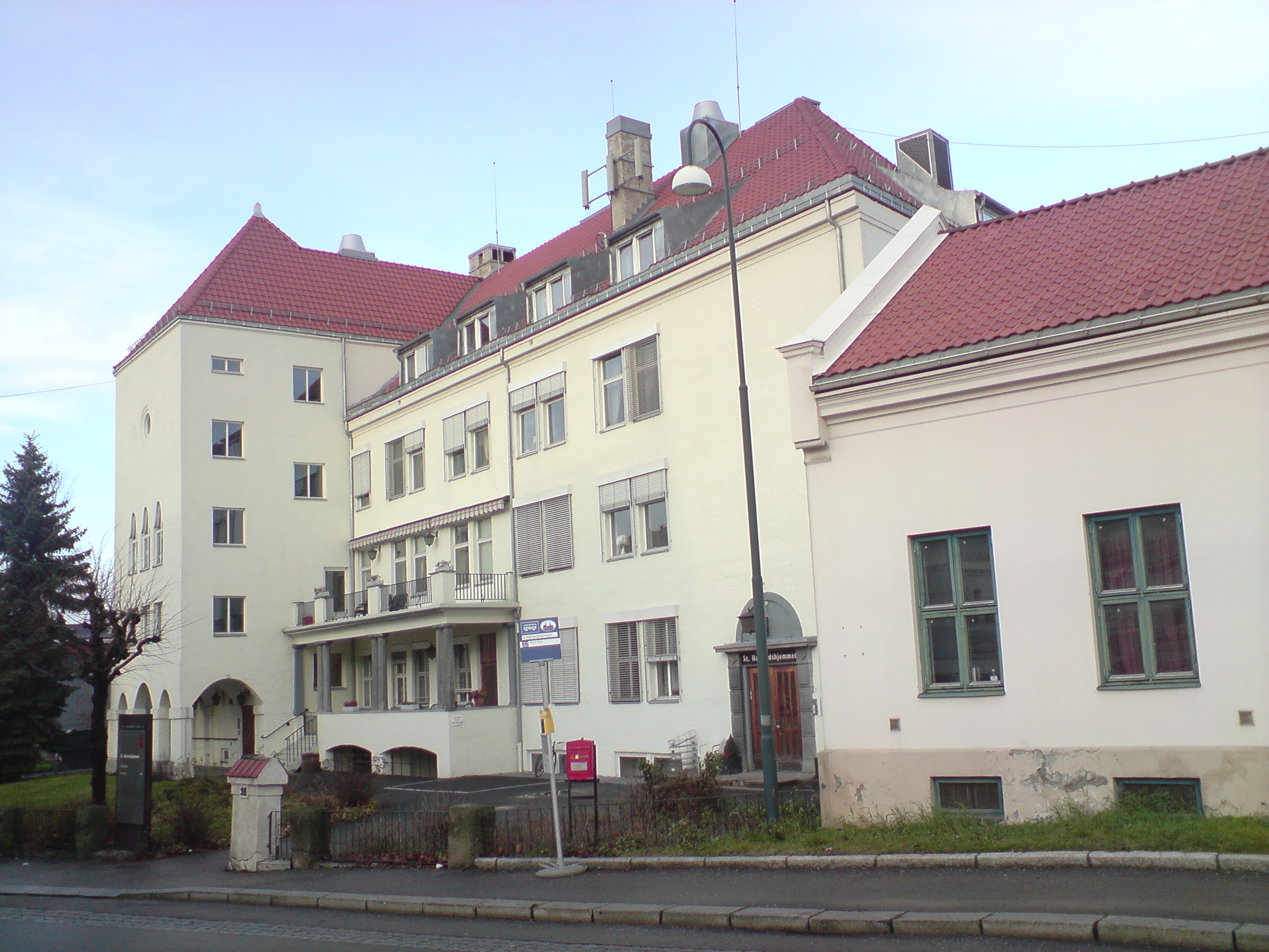 Gamlebyen Alders- og Sykehjem i Oslo